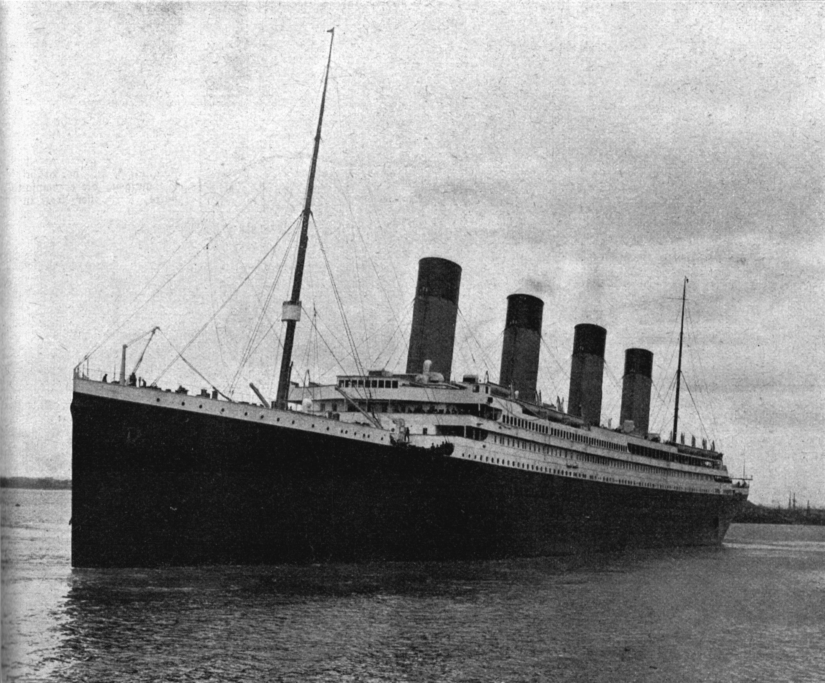 RMS Titanic. Original description text in